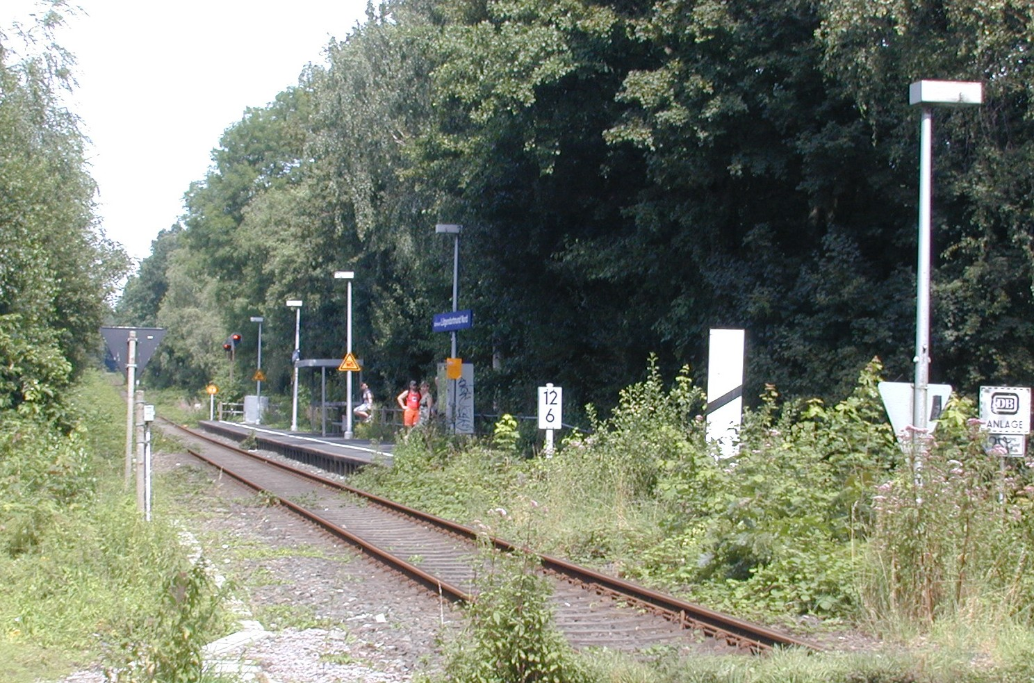 Bahnhof Dortmund-Lütgendortmund Nord